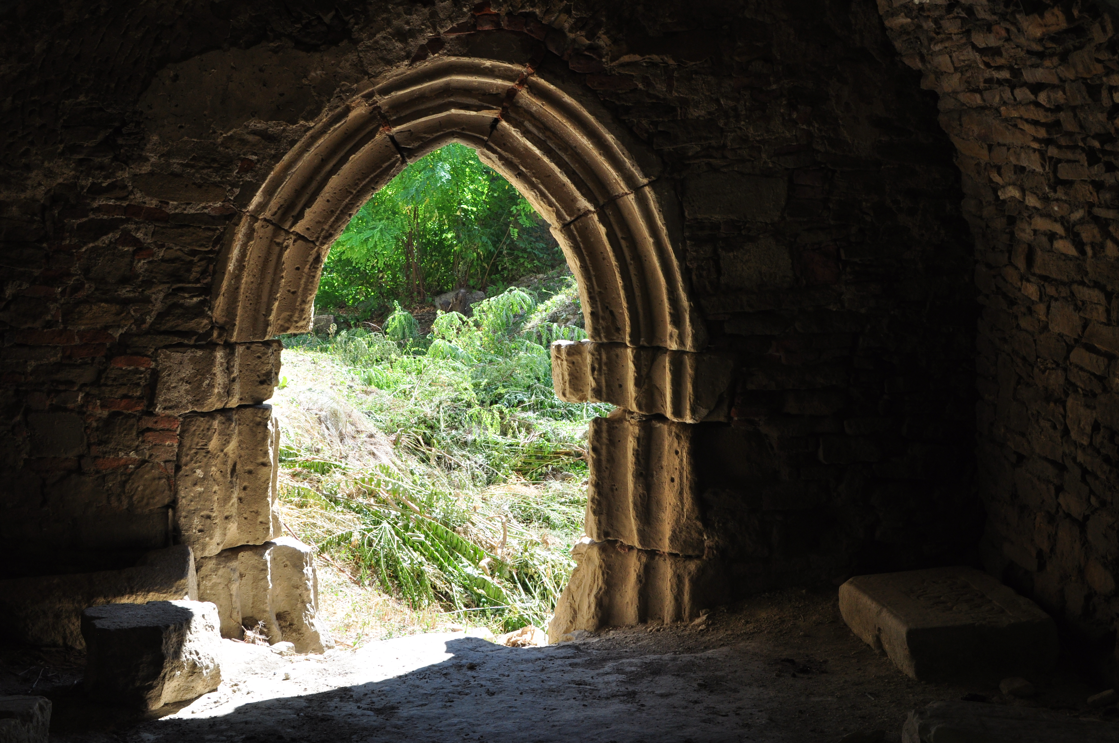 RO IS Biserica catolică din Cotnari (detaliu)